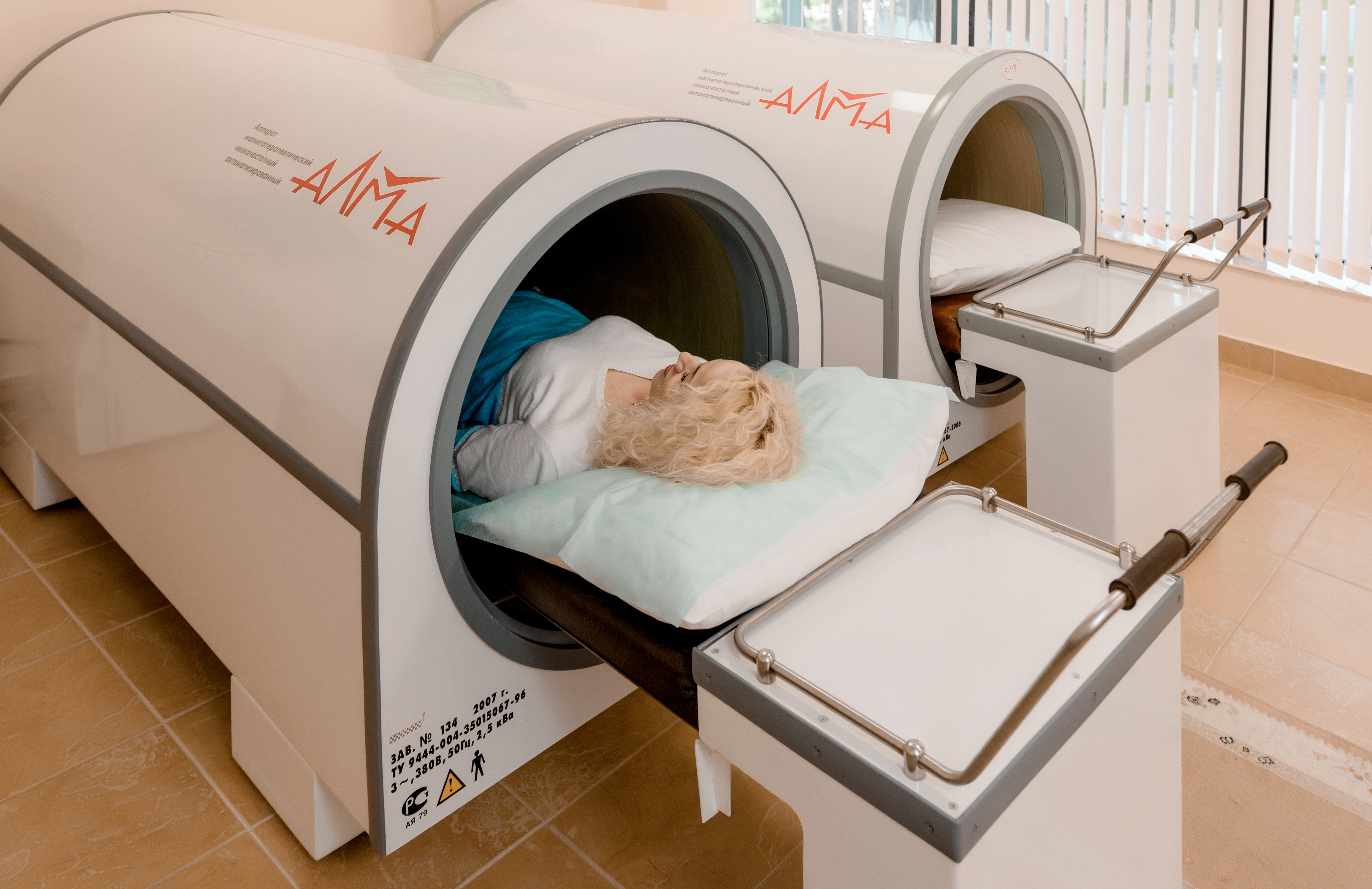 медицина заполярье